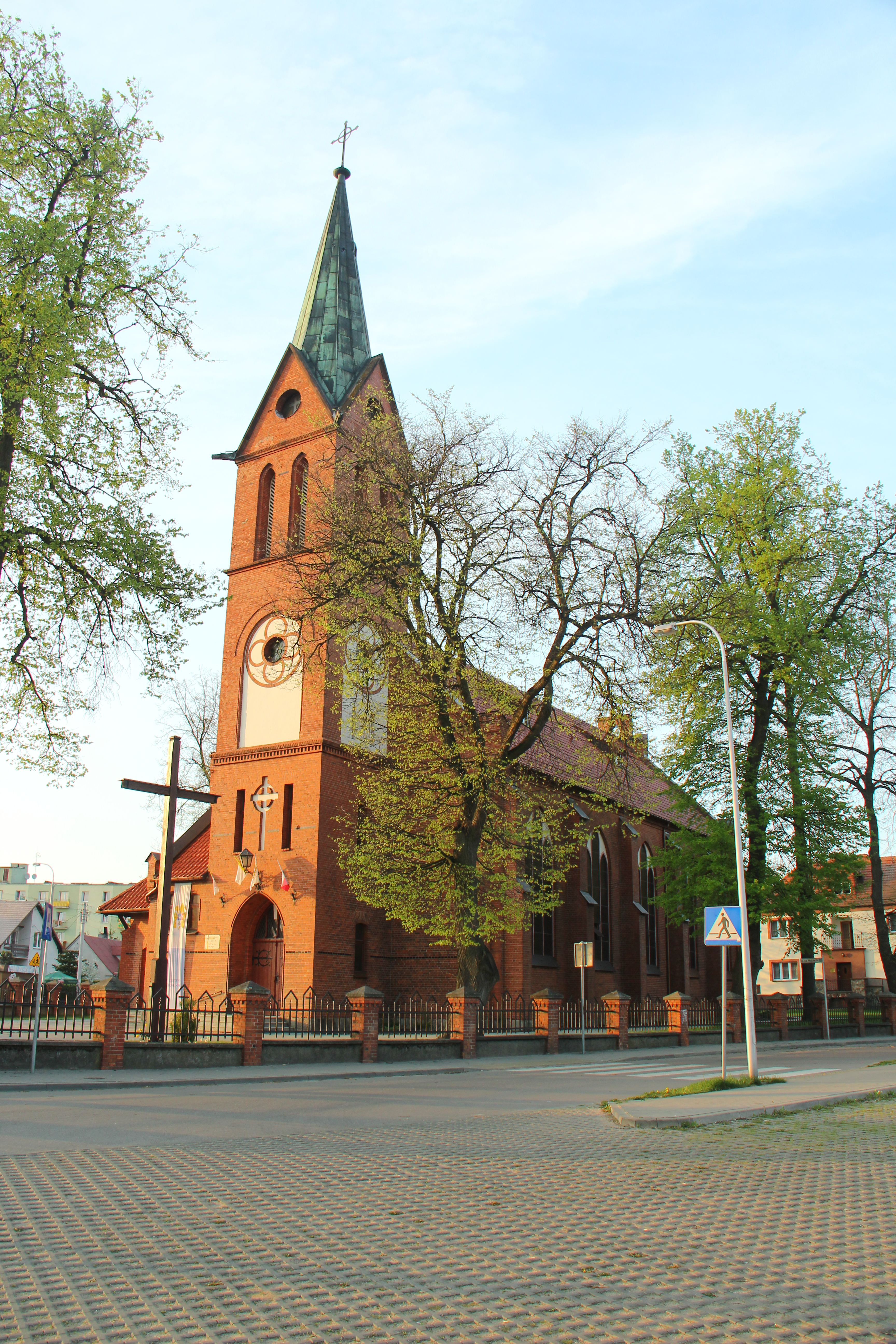 Działdowo, ul. Nidzicka 4 - rzymskokatolicki kościół parafialny pw. św. Wojciecha, 1896-1897